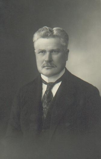 Фотография литовского политика Йонаса Стаугайтиса